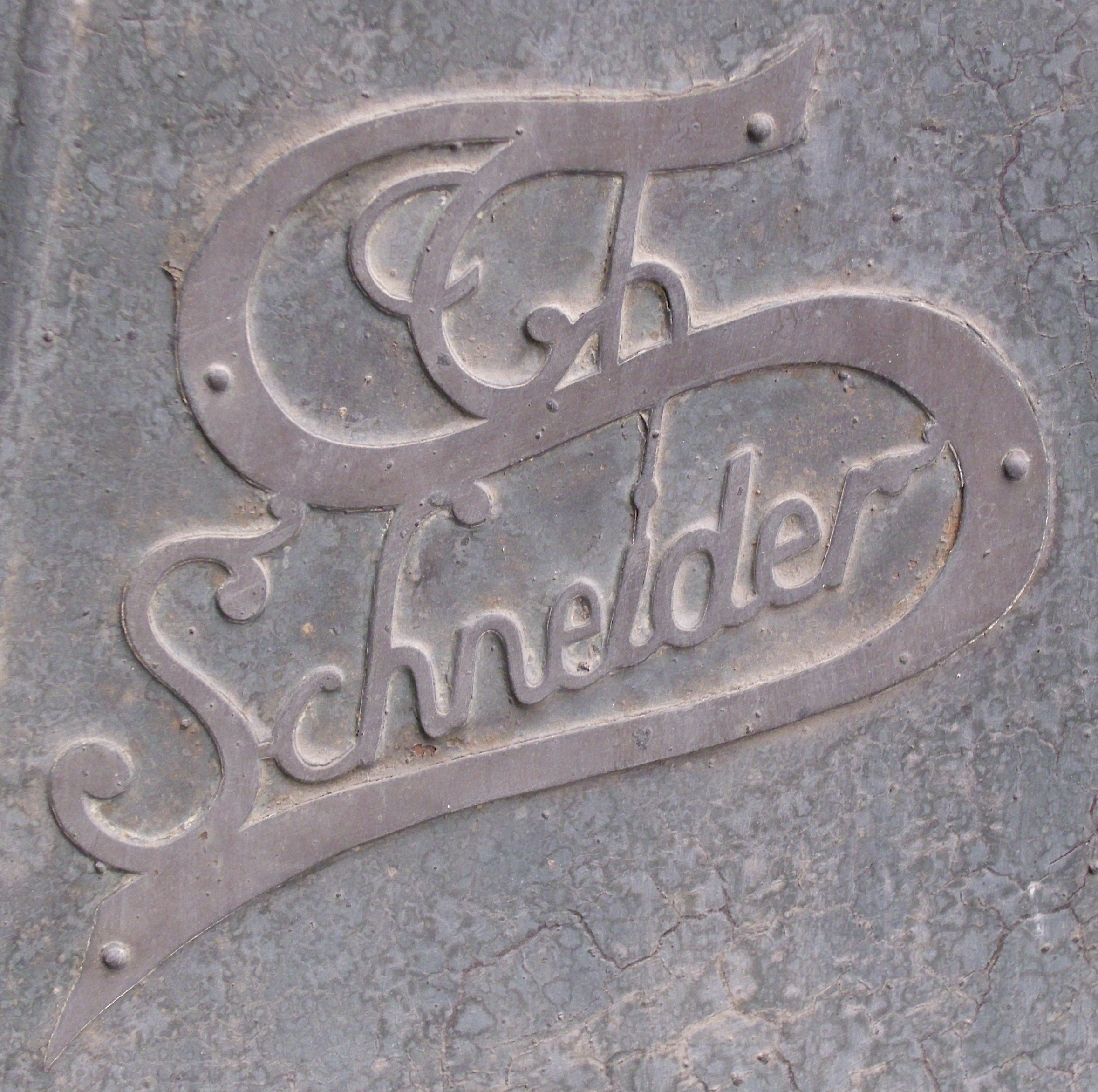 Emblem Th. Schneider